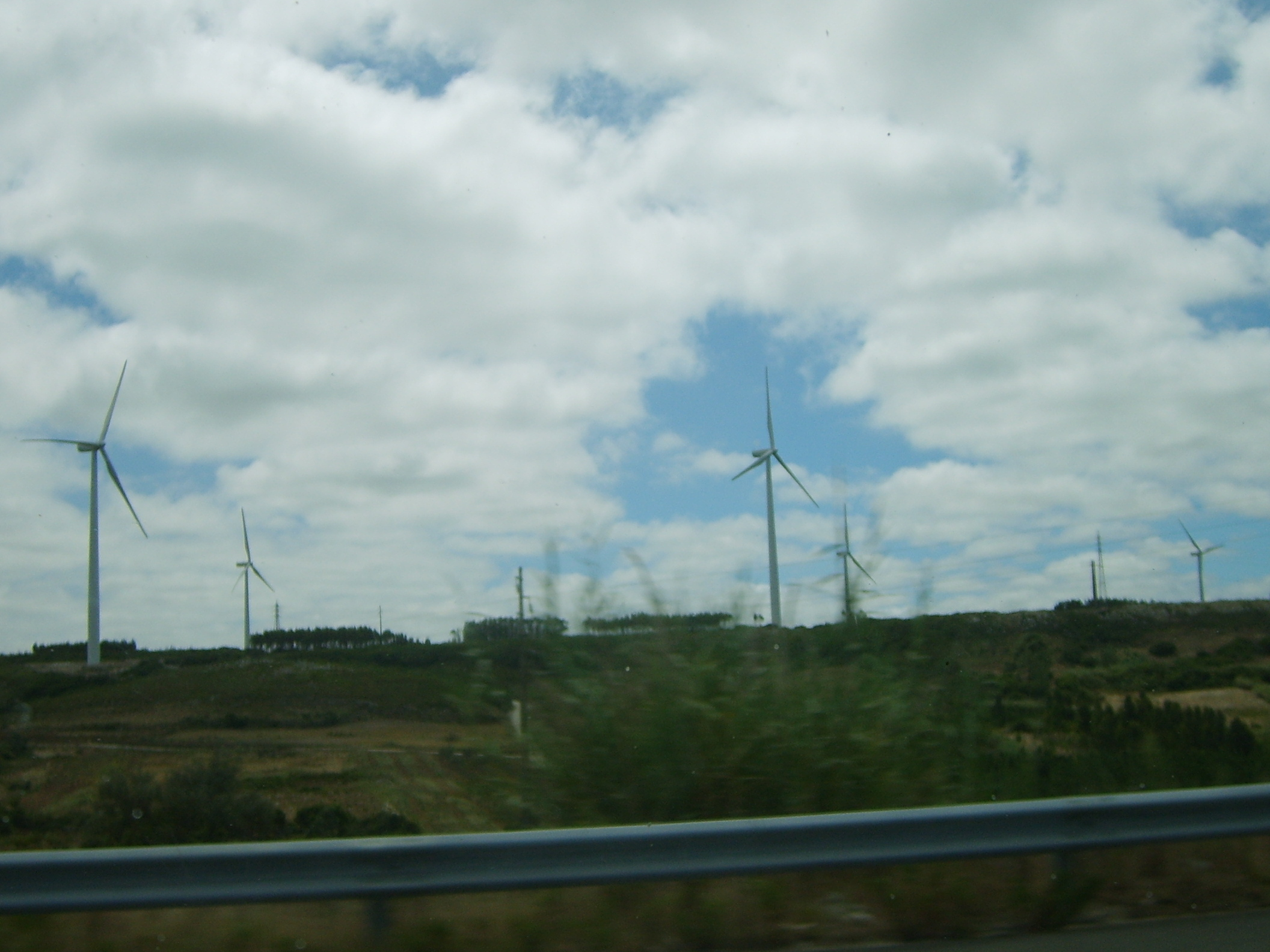 IP6